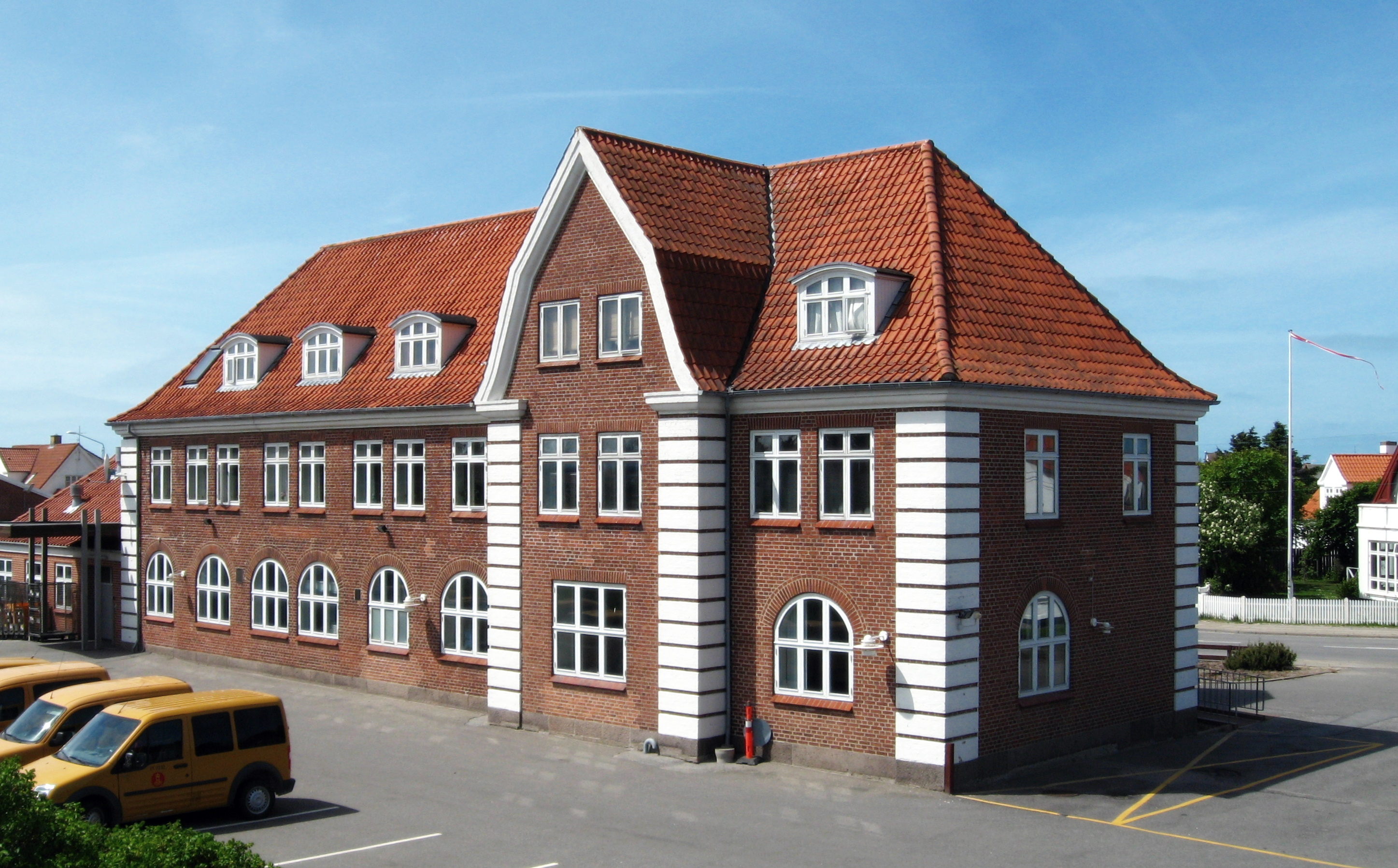 Gl. station i Løkken (Hjørring-Løkken-Aabybro Jernbane)